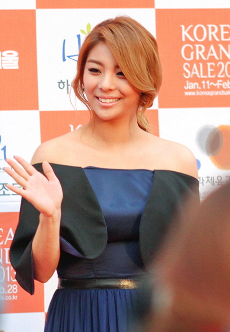 130131 서울가요대상 레드카펫 에일리